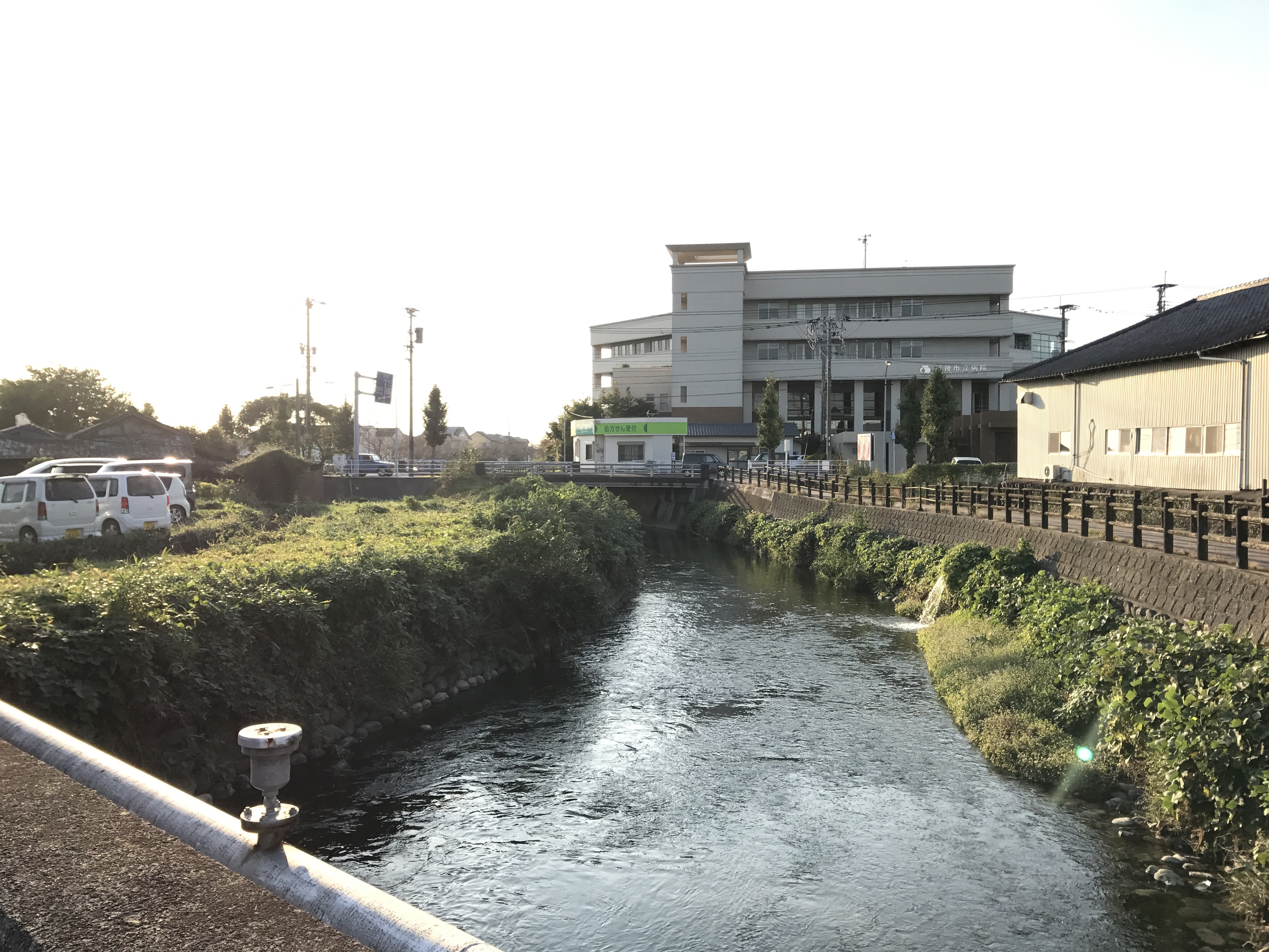 和泉橋より望む花宗川(下流側)と筑後市立病院